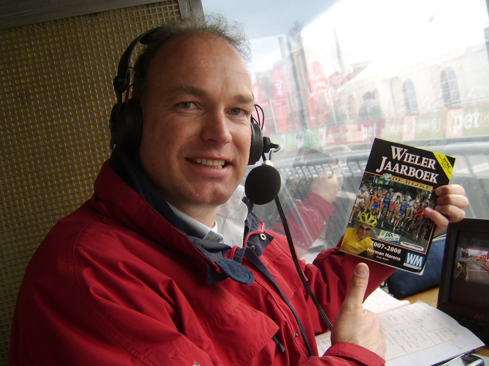 Herbert Dijkstra (Smilde, 13 juli 1966) is een voormalig Nederlands schaatser en wielrenner, die na zijn actieve sportloopbaan sportverslaggever werd.